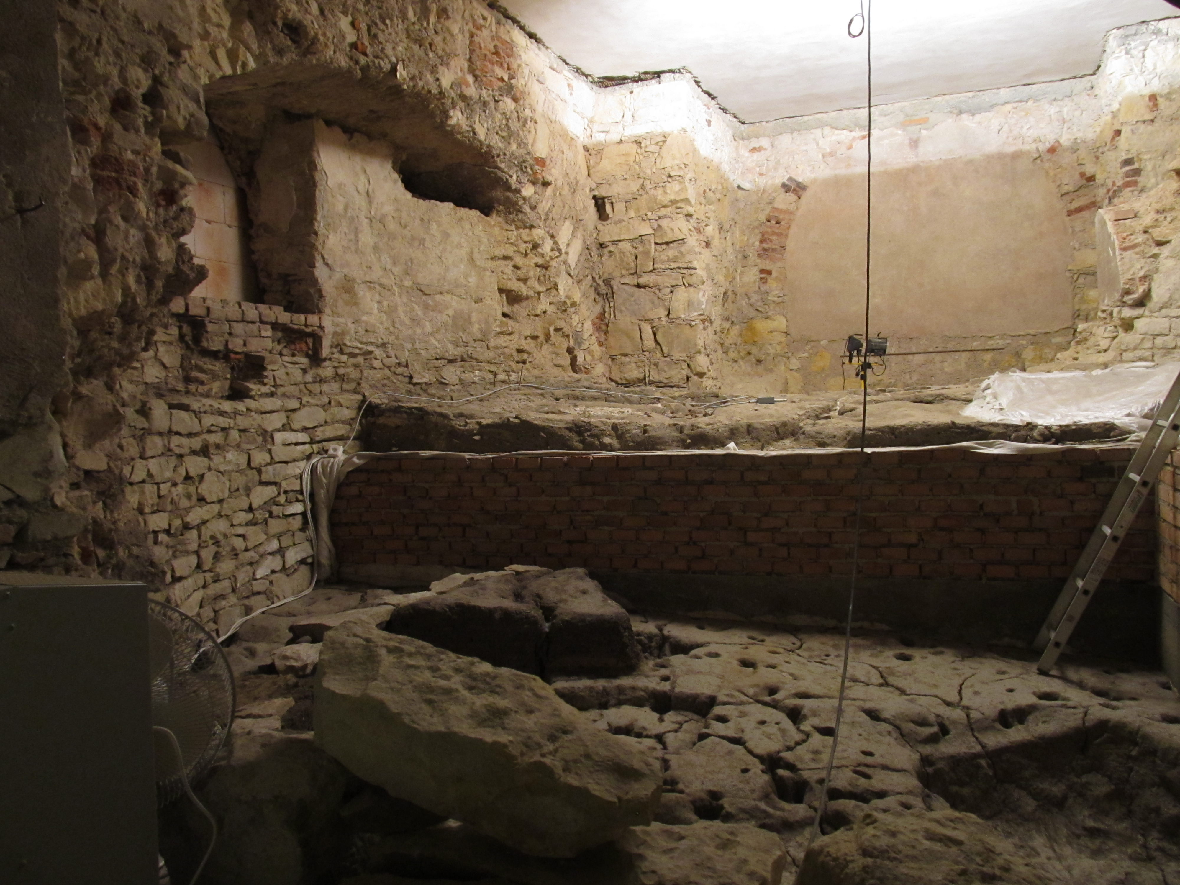 Zbytky románské rotundy sv. Václava v bývalém profesním domě na Malé Straně.